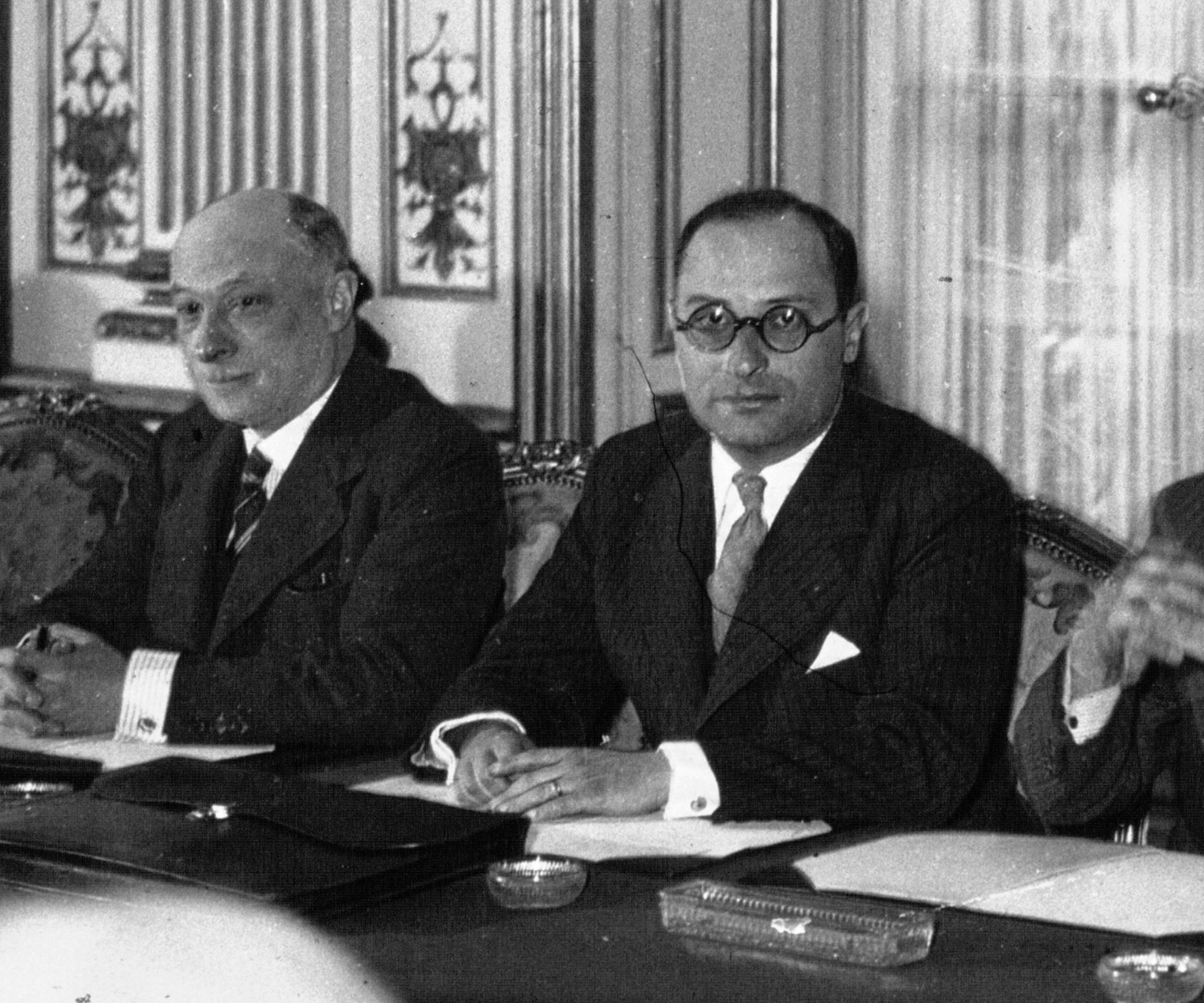 Marc Rucart et Jean Zay.